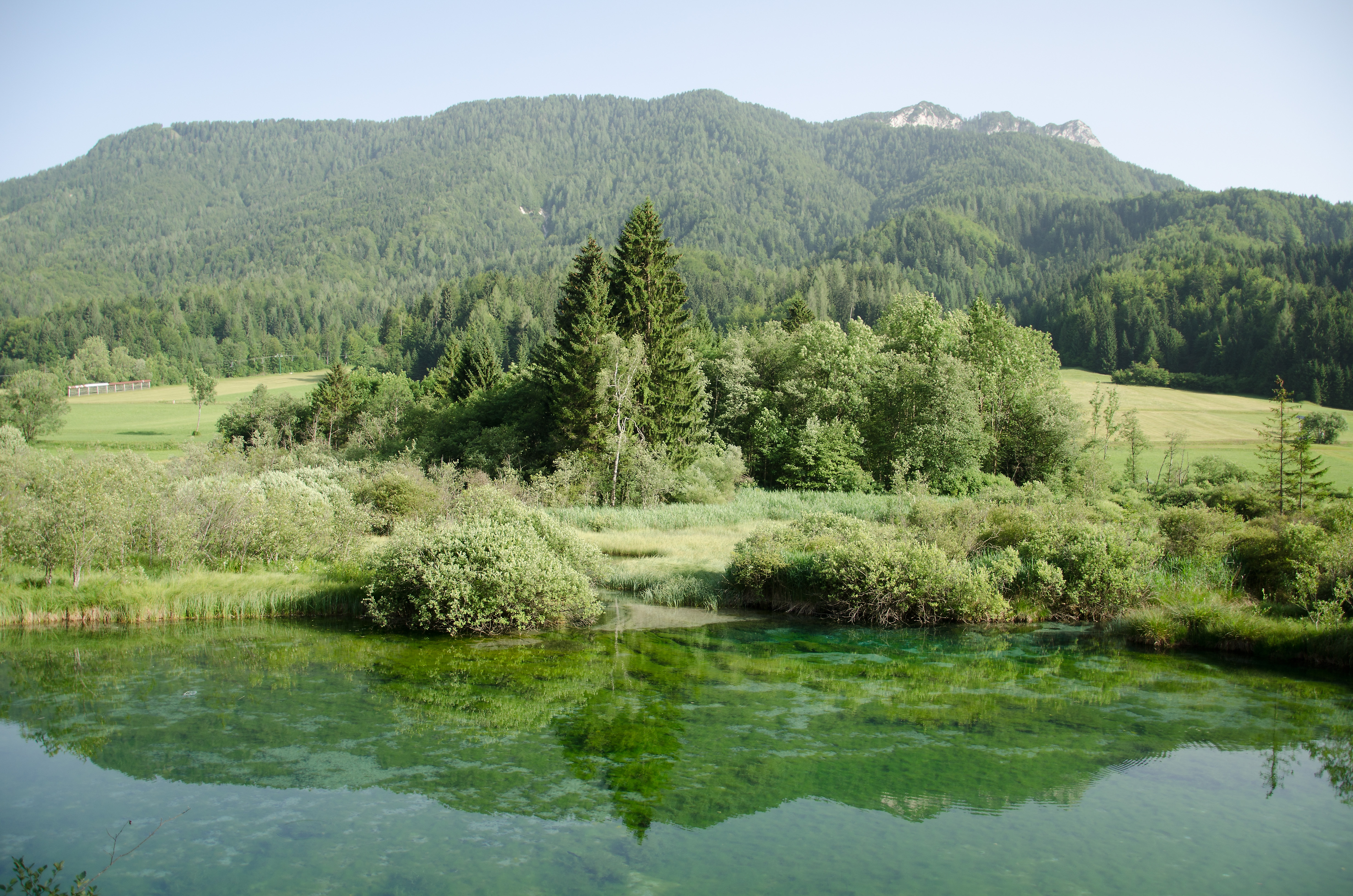 Zelenci_Sava_Dolinka_Spring